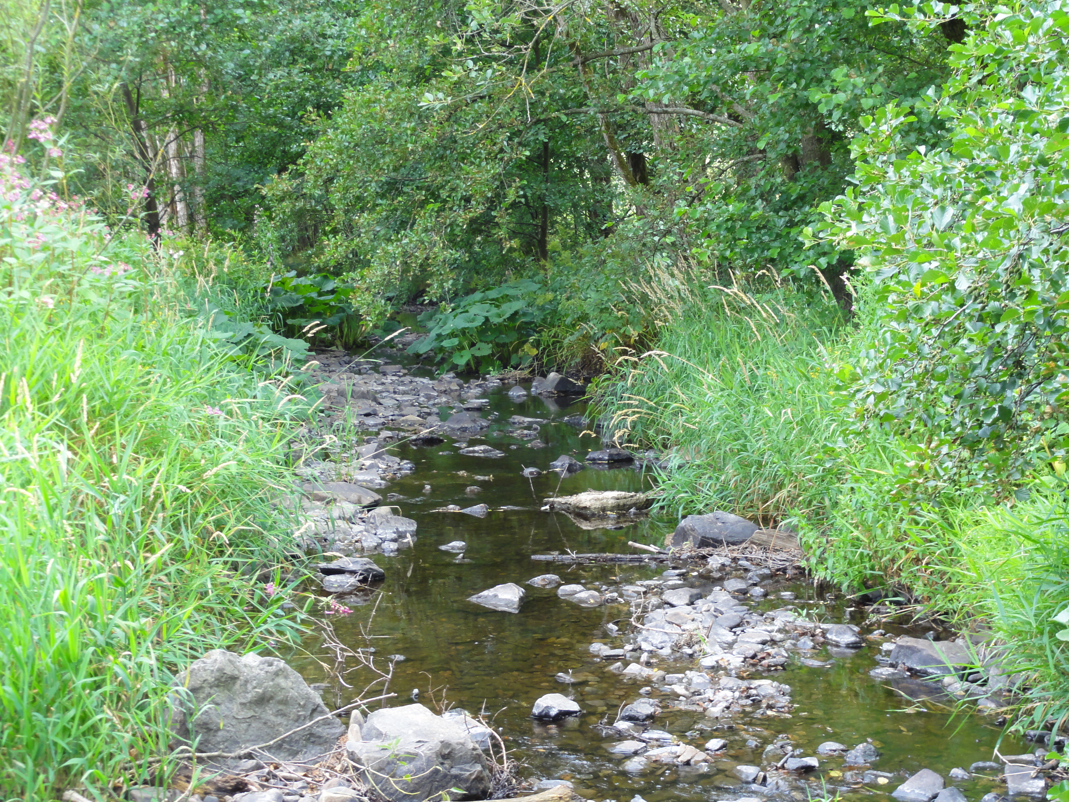 Mittlerer Bachabschnitt im wasserarmen Hochsommer